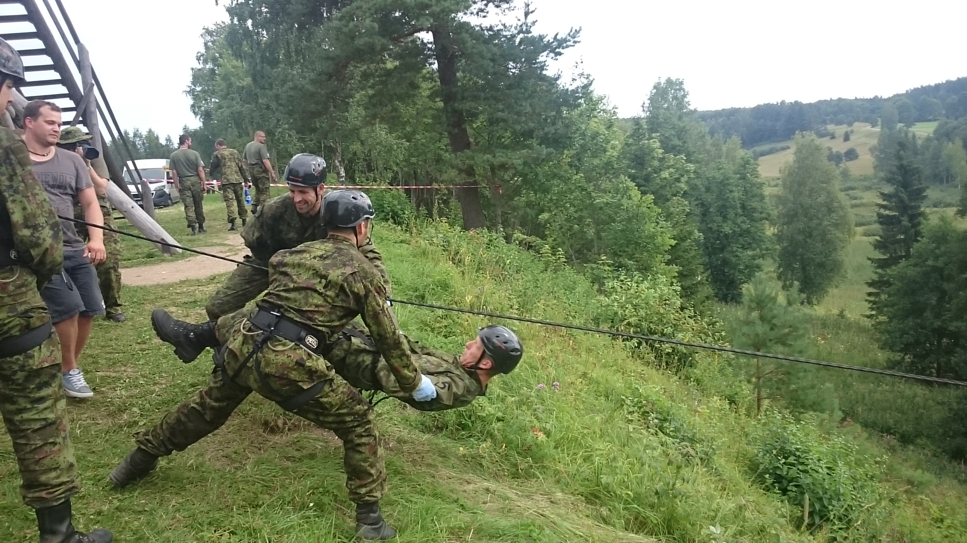 Admiral Pitka luurevõistlus 2015, Rõuge